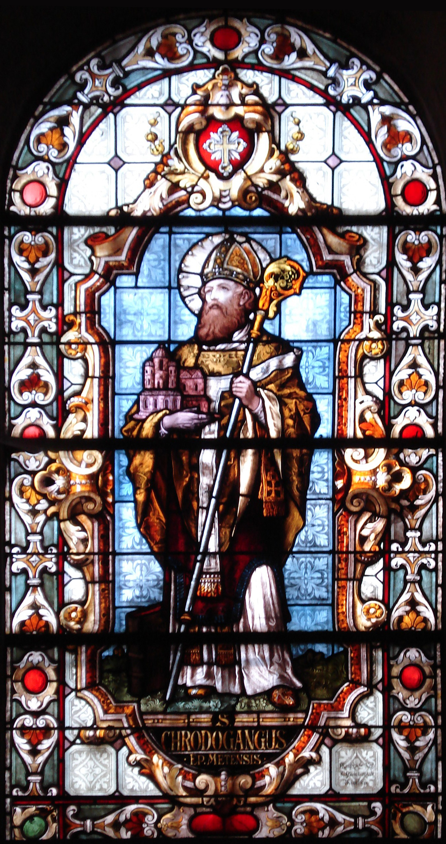 Saint Chrodegang de Metz, vitrail de la chapelle Sainte-Glossinde de Metz.